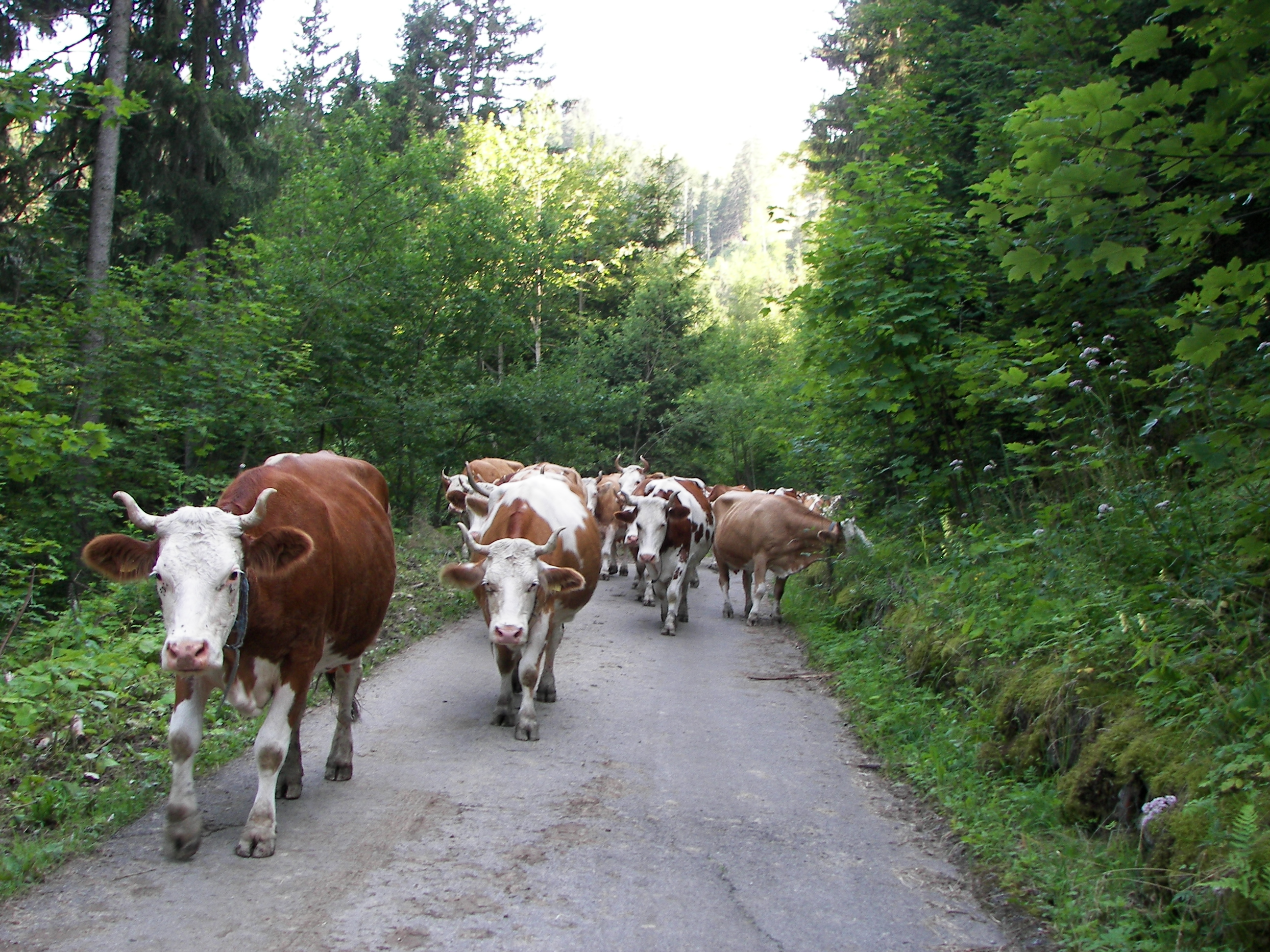 Ici elles font: le lait - la double crème - le fromage - le chocolat - les macarons